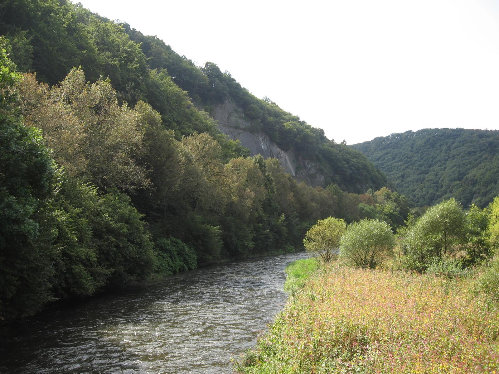 The Sûre river at Erpeldange near Ettelbruck